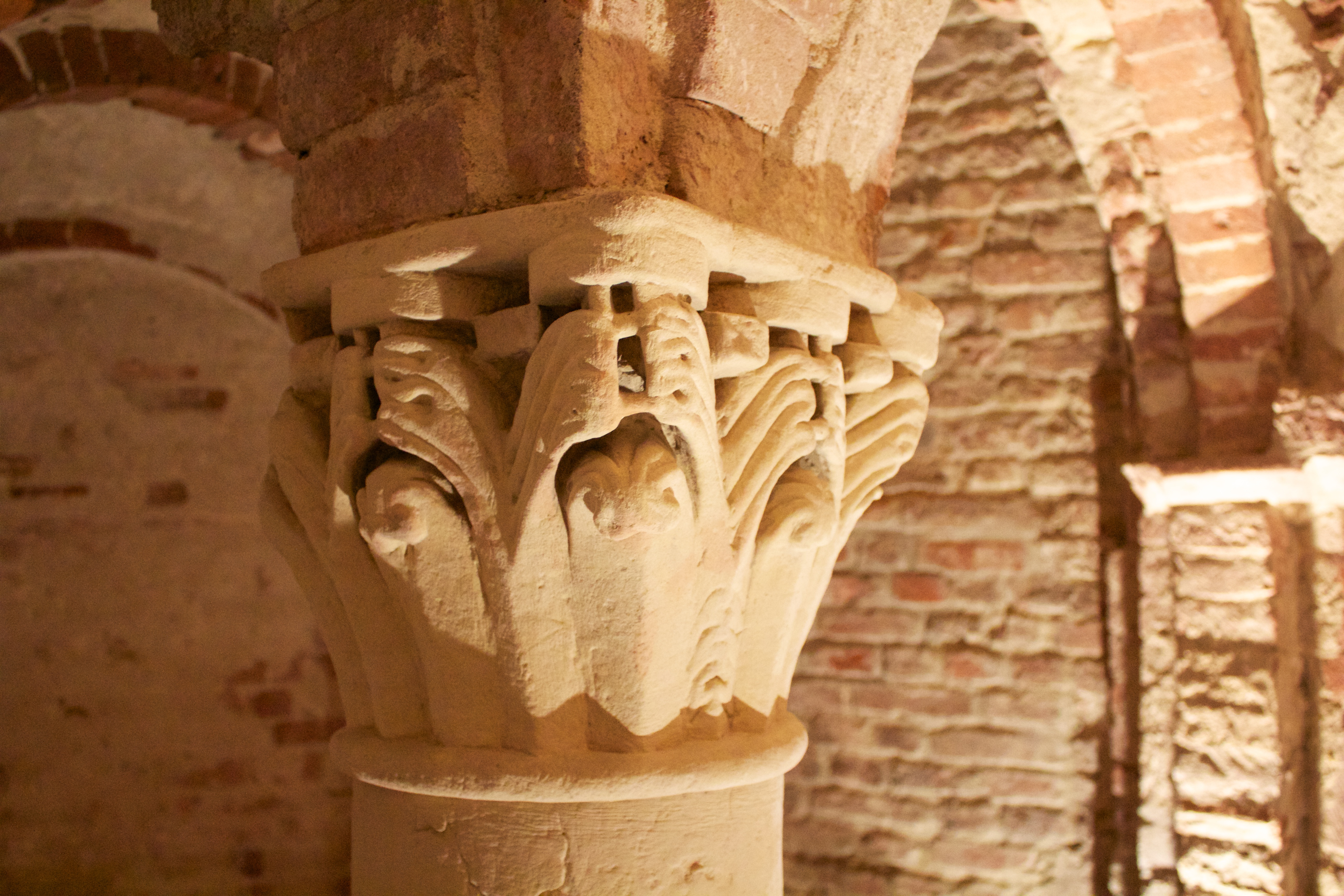 Cripta e Museo di Sant’Anastasio, Asti This is a photo of a monument which is part of cultural heritage of Italy.